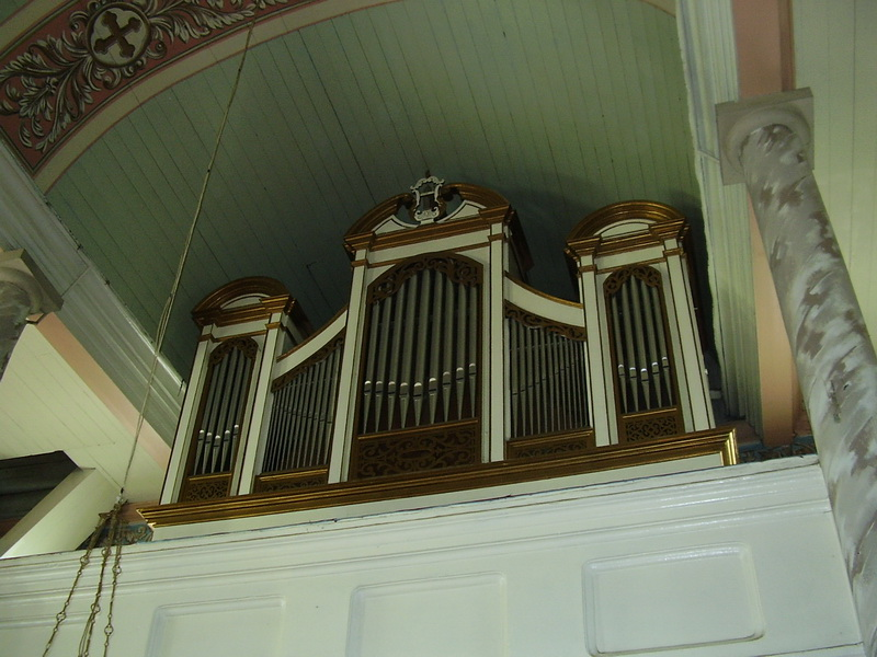 Лунна. Касцёл. Арган